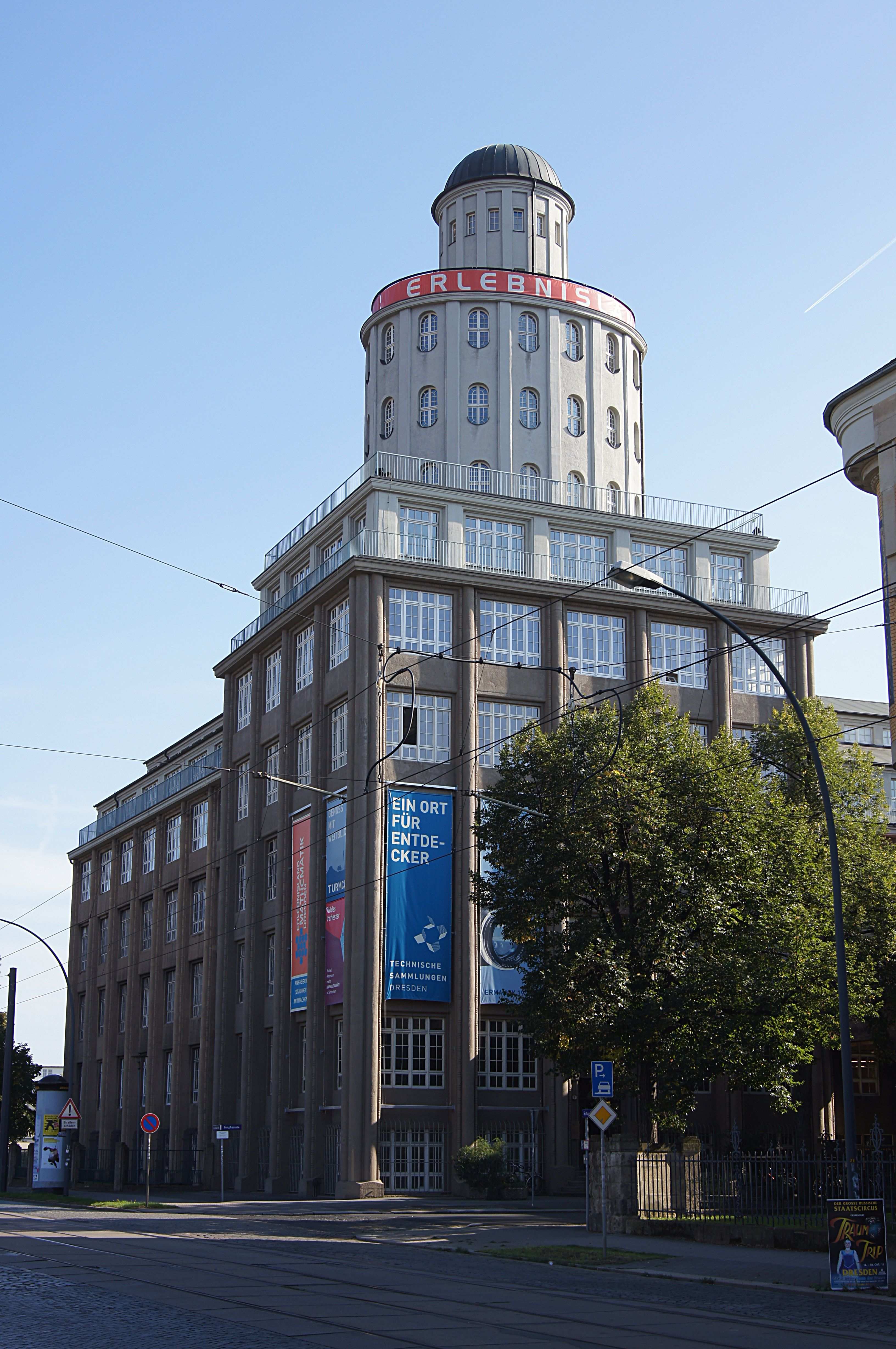 Turm der Ernemann-Werke, Sitz der Technischen Sammlungen Dresden.